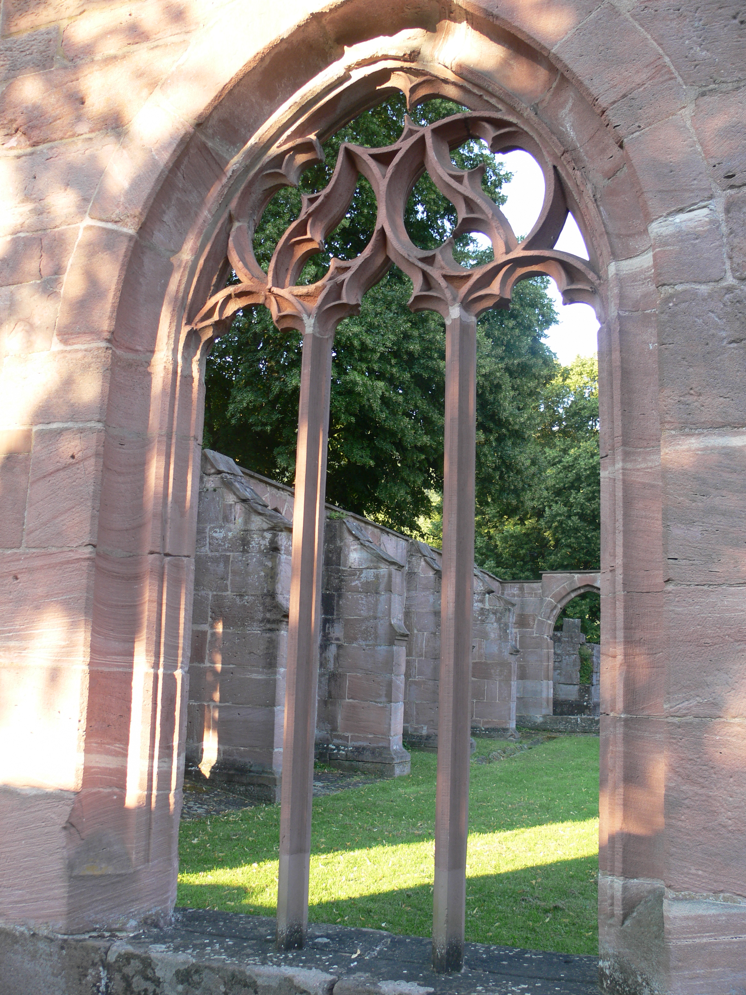 Ehem. Kloster St. Peter und Paul Hirsau, Calw: Gotisches Maßwerkfenster der Klosterruine